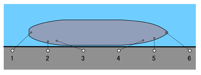 係留索 1.船首索 2.前方ブレスト・ライン 3.前方スプリング・ライン 4.後方スプリング・ライン 5.後方ブレスト・ライン 6.船尾索.